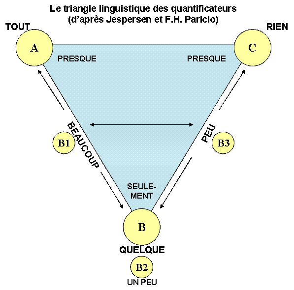 Triangle des quantificateurs, d'après Jespersen et F.H.Paricio